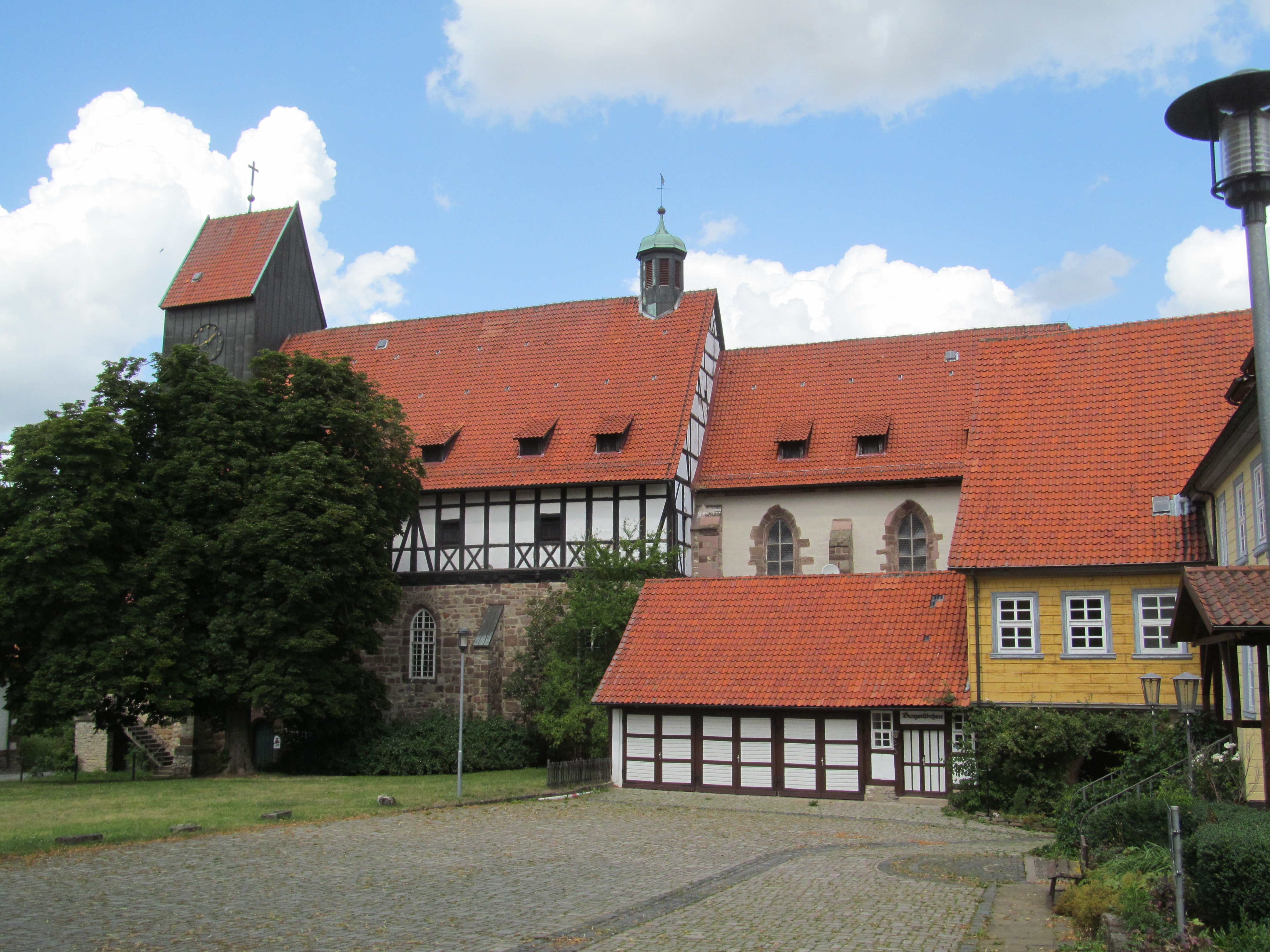 die Kirche St. Johannes auf dem Burgberg von Katlenburg